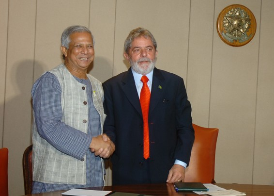 O presidente Luiz Inácio Lula da Silva recebe em audiência o ganhador do Prêmio Nobel da Paz de 2006, Muhammad Yunus.